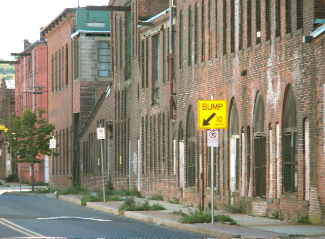 River St. Fair Haven